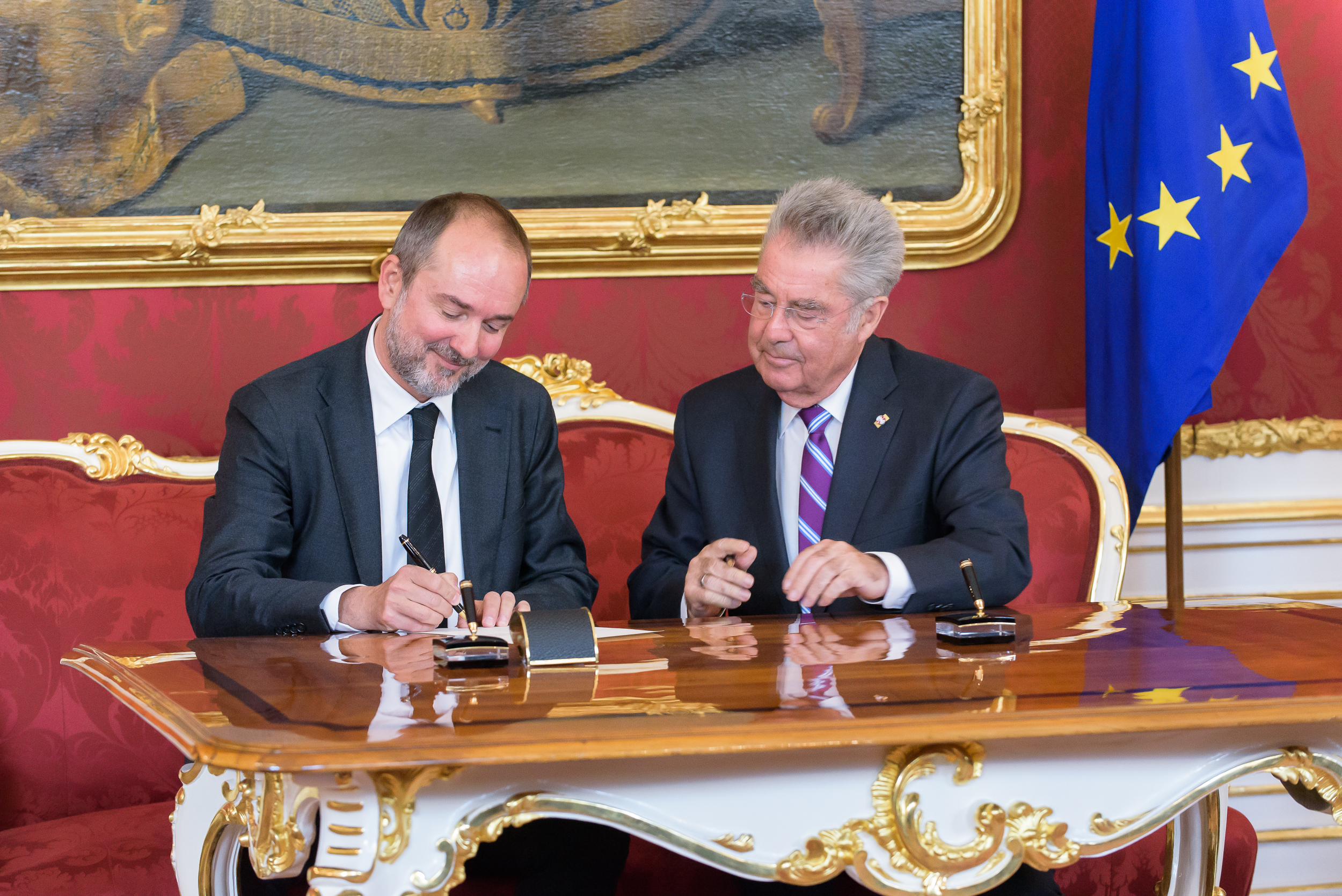 Thomas Drozda bei seiner Angelobung als Kanzleramtsminister mit Bundespräsident Heinz Fischer